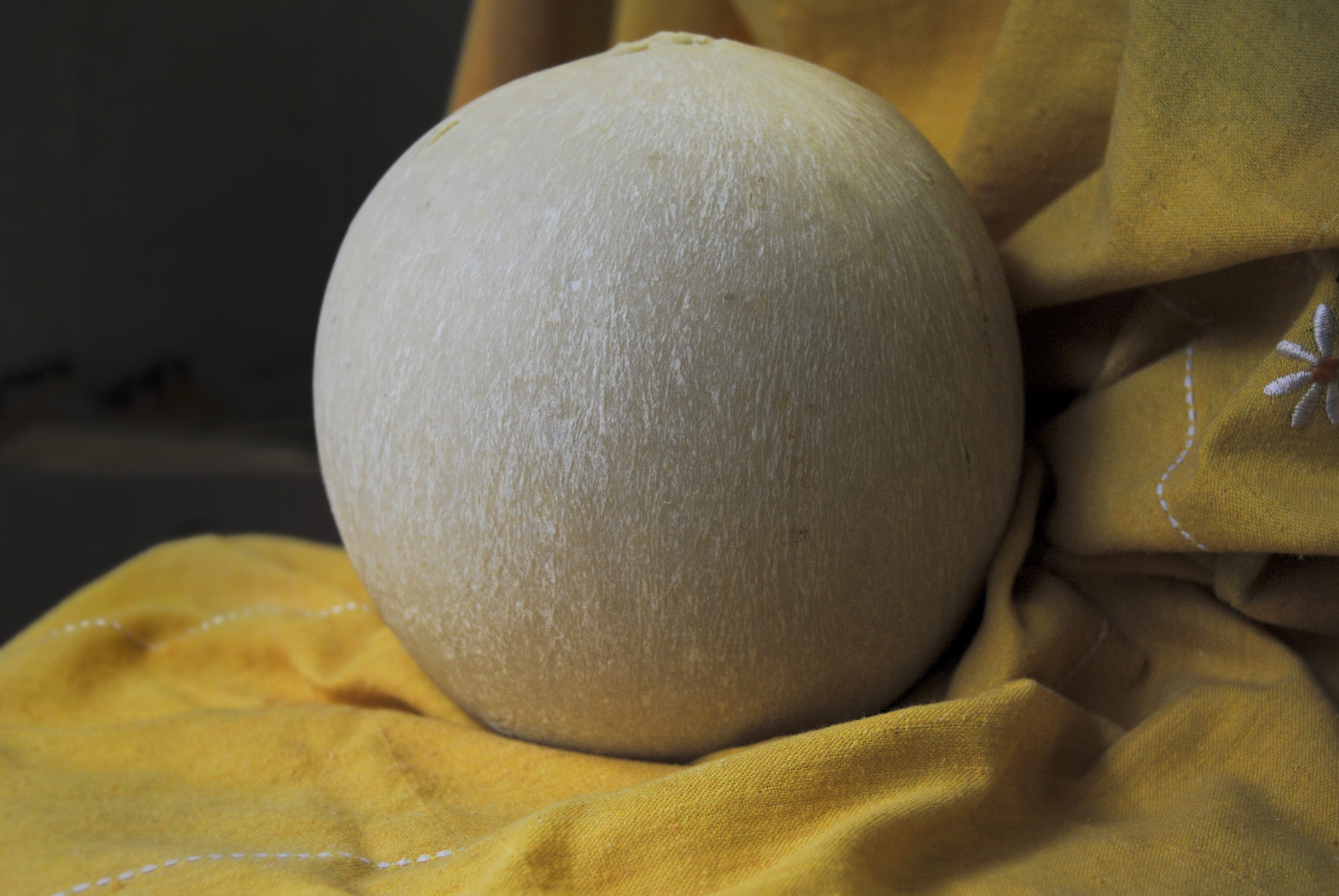 Pallone di Gravina stagionato di 3 mesi. Autore: Antonio Cucco Scattata durante il mese di agosto dell'anno 2010 in un caseificio di Gravina in Puglia.